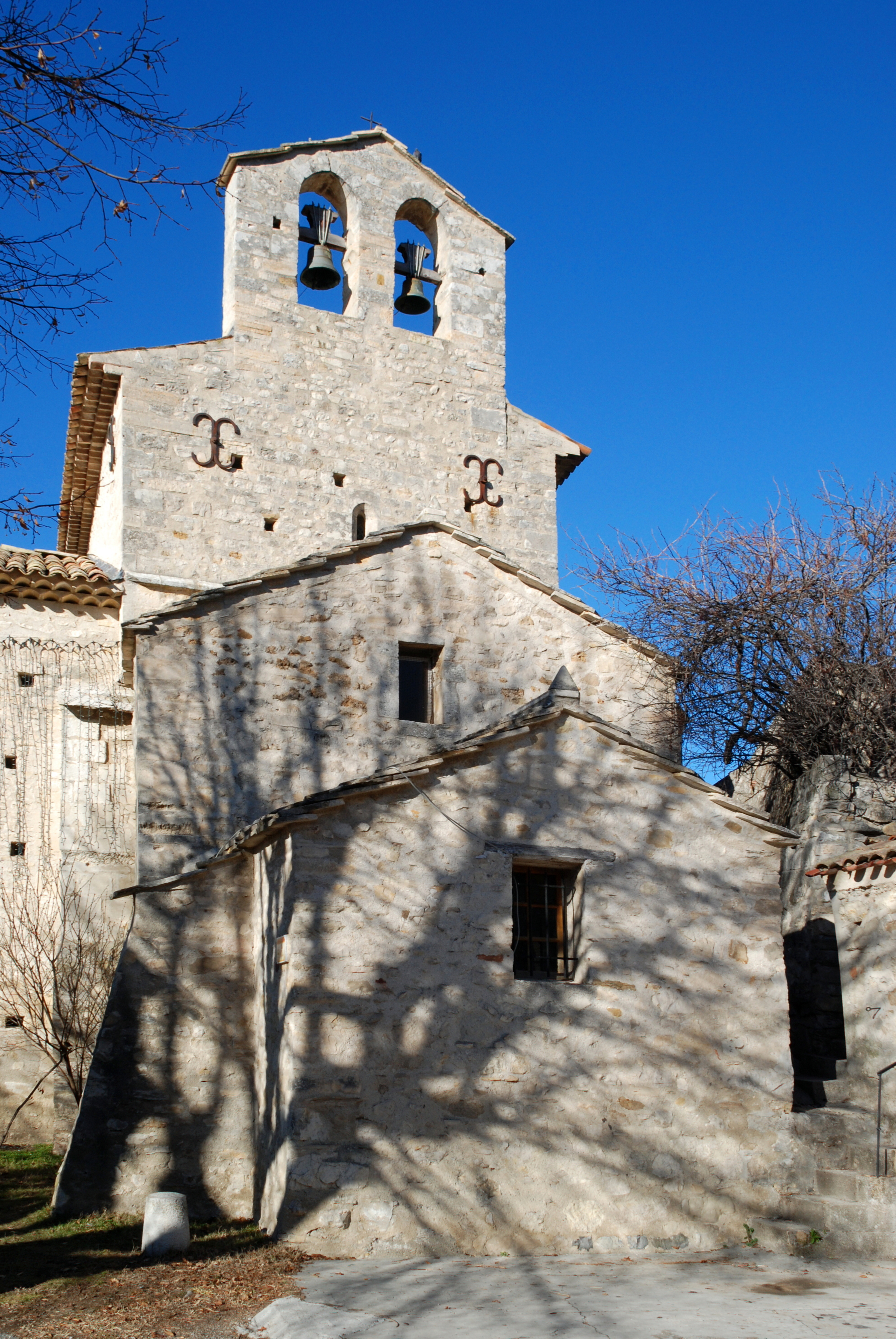 France - Provence - Alpes-de-Haute-Provence - Église de Saint-Martin-les-Eaux